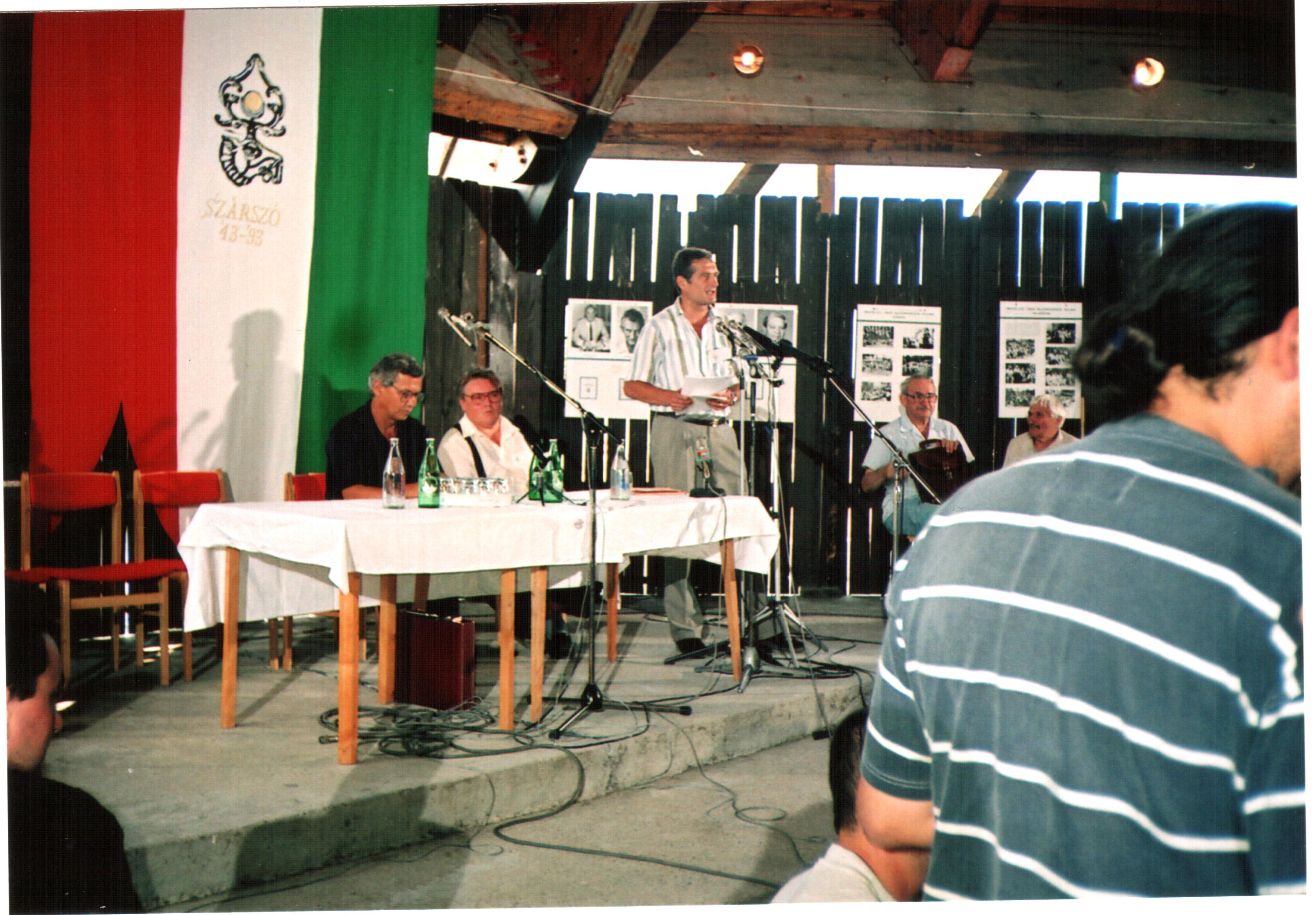 Kiss Gy. Csaba, Csurka István, Kósa Ferenc. A felvétel 1993. augusztus hó 24- én készült Balatonszárszón. Püski Sándor az 1943 –as Szárszói Magyar Élet Konferencia 50. évfordulójának tiszteletére szervezte a találkozót. A találkozón jelen voltak: Püski Sándor, Csurka István (21,22,23, Bíró Zoltán (13), Szűrös Mátyás 28), Jobbágyi Gábor, Surján László (29), Tábori László (32), Bégány Attila (32, 37), Elekes Andor (5,6,8,35), Füzessy Tibor (14), 1943. augusztus. 23.-28 –a között Püski Sándor Magyar Élet találkozót szervezett nemzeti kérdések megvitatására a Soli Deo Gloria balatonszárszói üdülőjében. Diákok, írók, politikusok, hírlapírók, egyesületi vezetők, munkás- és parasztfiatalok egyaránt a résztvevők között voltak. A vitákban részt vettek a KALOT, az EMSZO és a Hivatásszervezet tagjai is. A megbeszélések témája az 1939 óta tartó világháború., a magyar. nép állapota és a magyar nemzet háború utáni jövője. Az ismertebb előadók és fölszólalók: Németh László (1901-75), Kodolányi János (1899-1969), Veres Péter (1897-1970), Erdei Ferenc (1910-71), Karácsony Sándor (1891-1952), Féja Géza (1900-78), László Gyula (1910-98), Szabó Pál (1893-1970), Jócsik Lajos (1910-80), Nagy István (1904-77), Szabédi László (1907-59). A legelevenebb érdeklődést Erdei Ferenc és Németh László vitája váltotta ki. Erdei az esélyek alakulásából már kirajzolódni látszó 'szocializmus', utóbbi a kapitalizmus és a szocializmus közötti 'harmadik út' mellett érvelt. A résztvevők döntő többsége az utóbbival rokonszenvezett. Források: Szárszó '93 Az 1993 évi szárszói tábor előadás és megbeszéléssorozata Püski, Budapest, 1993 Borbándi Gyula: A magyar népi mozgalom. New York, 1983. (és Bp., 1989:336.) - Szárszó 1943. Budapest, 1983. - Püski Sándor: Könyves sors - magyar sors. Budapest, 2002. Őrző a strázsán Somodi István: Szárszó – Modell vagy emlék?